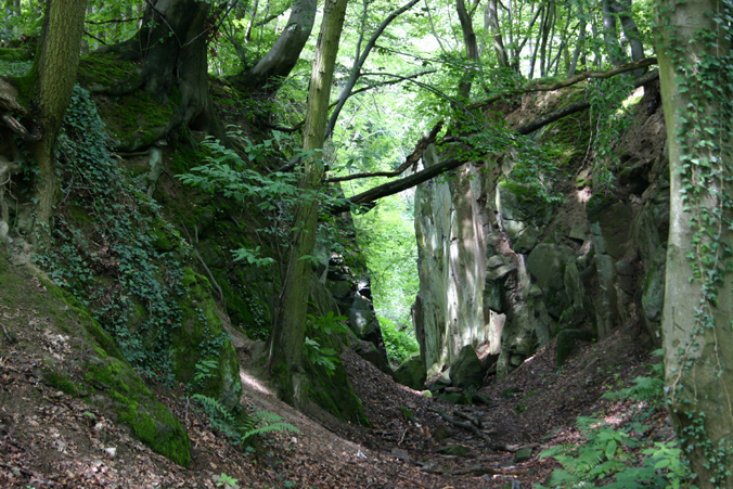 Stenzelberg im Naturpark Siebengebirge